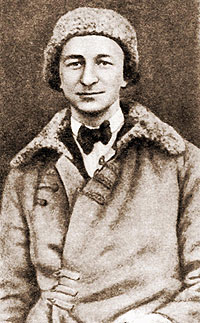 Поэт Николай Агнивцев